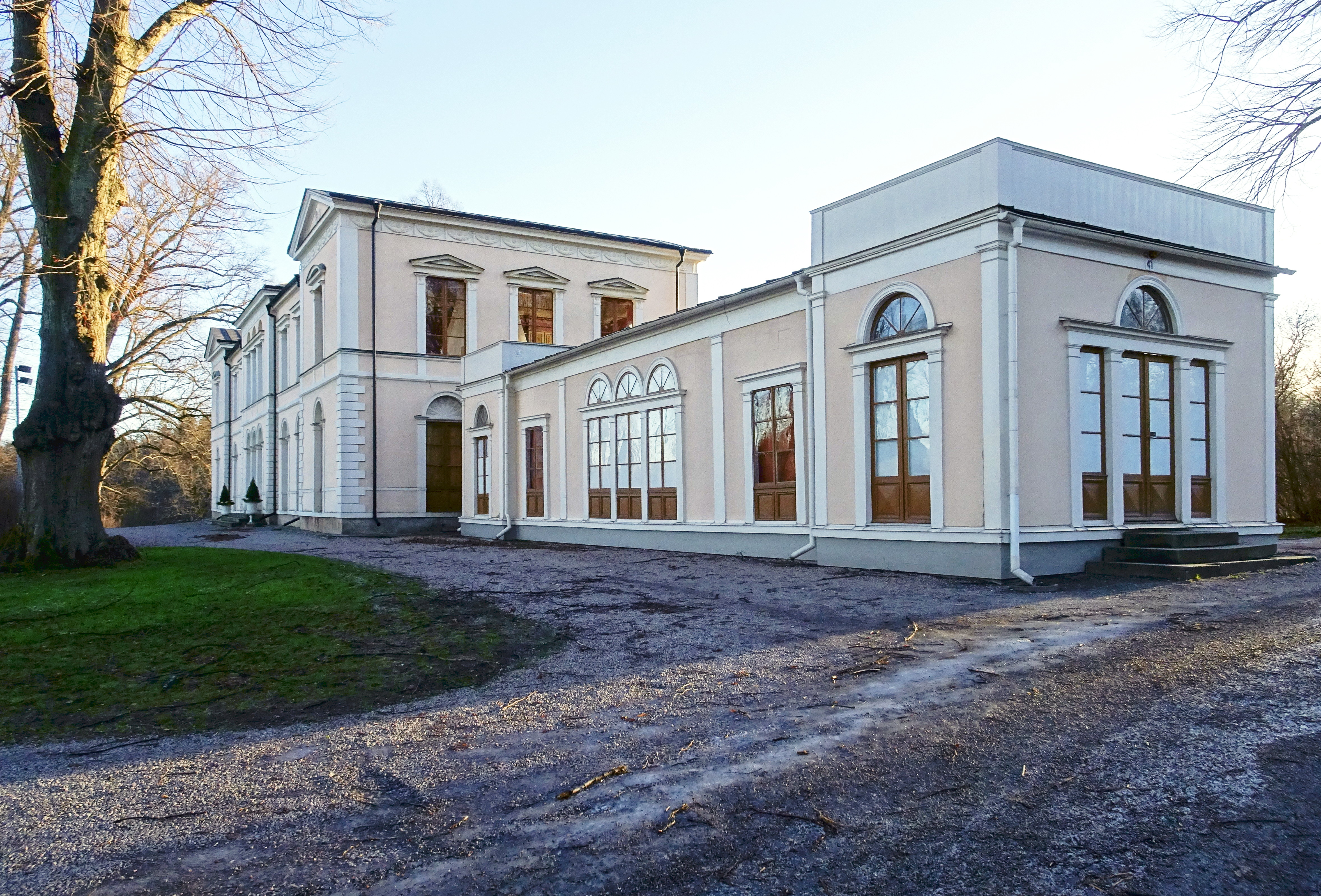 Rosendals slott, matsalslängan